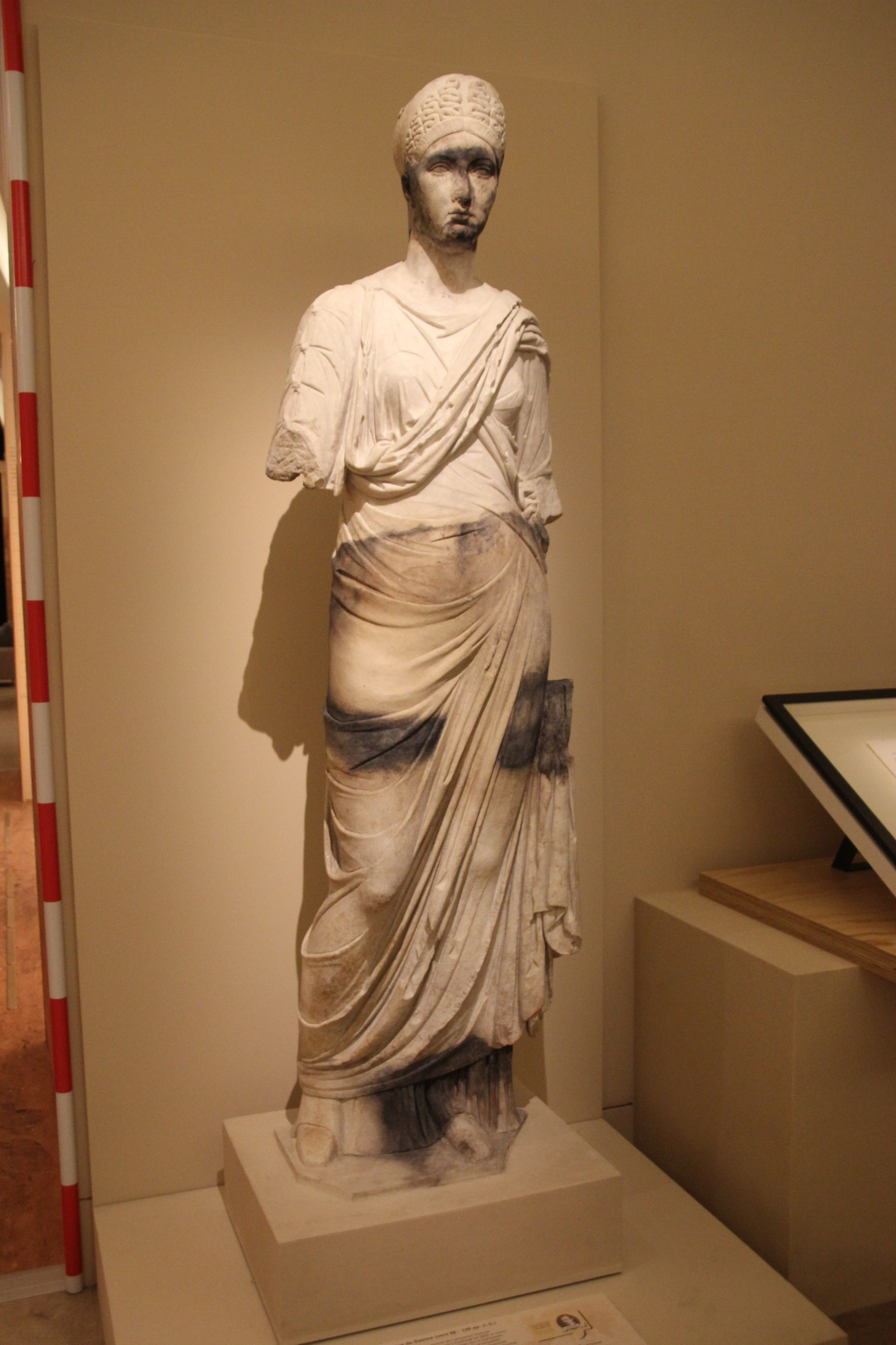 Sculpture of Vibia Sabina Carthage